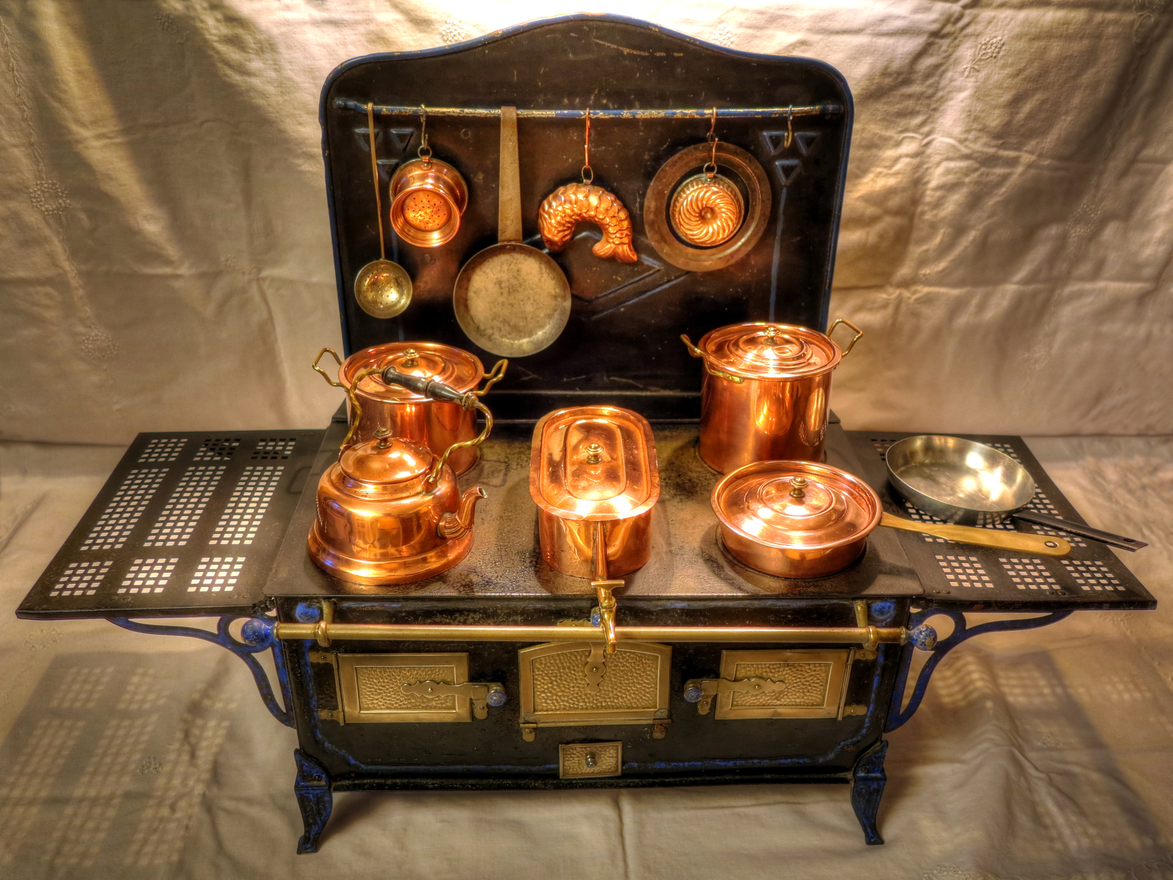 Puppenherd aus Blech mit 5 Kochstellen und drei Spiritusbrennern sowie diverses Kochgeschirr aus Kupfer. Besonders hervorzuheben ist das mittig gestellte Wasserschiff mit Wasserhahn und der Wasserkessel, Mitte 19. Jahrhundert. Abmessungen, ohne ausgeklappte Seitenteile in cm: Breite x Tiefe x Höhe = 40 x 30 x 55